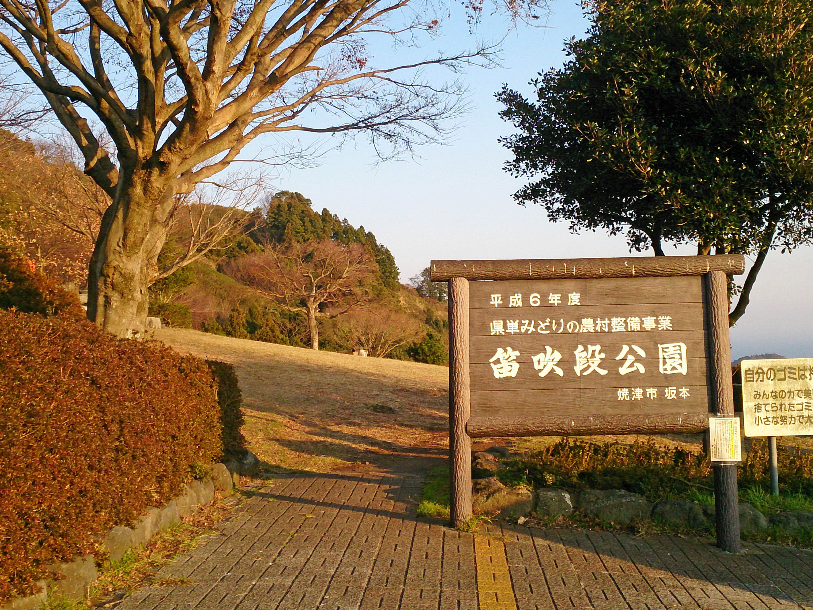 静岡県焼津市の笛吹段公園入口